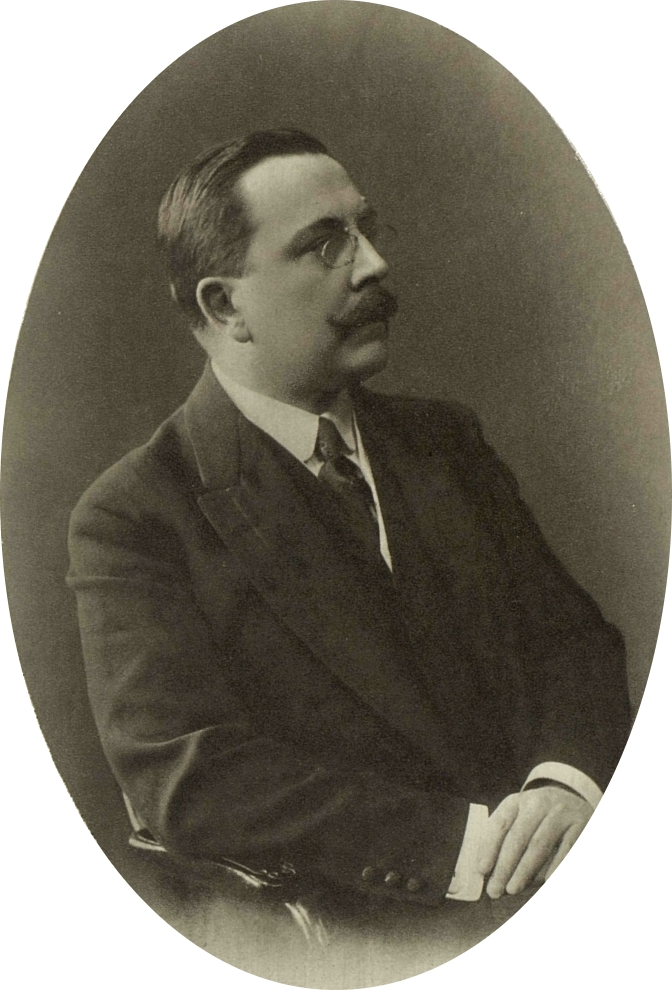 Александр Александрович Риттих, министр земледелия, сенатор.